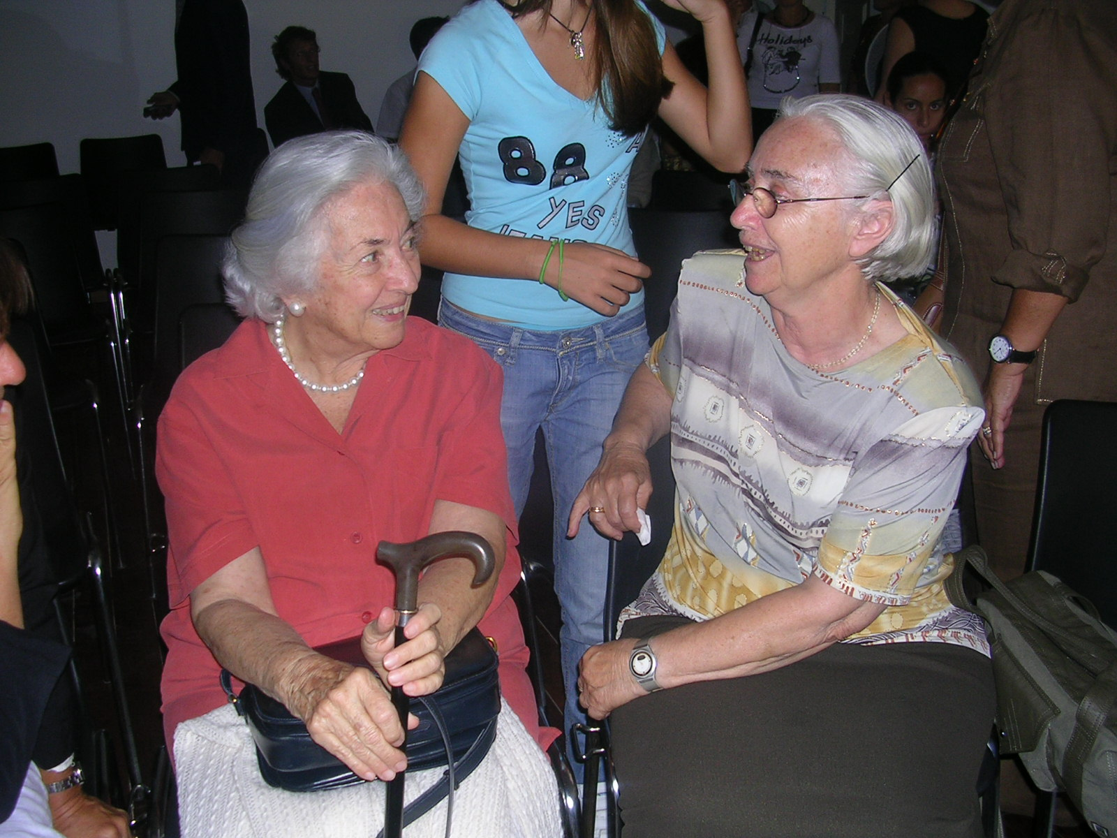 ריטה ויזל עם קתרינה נפוליאונה, נכדתם של רפאלו וקתרינה נפוליאונה